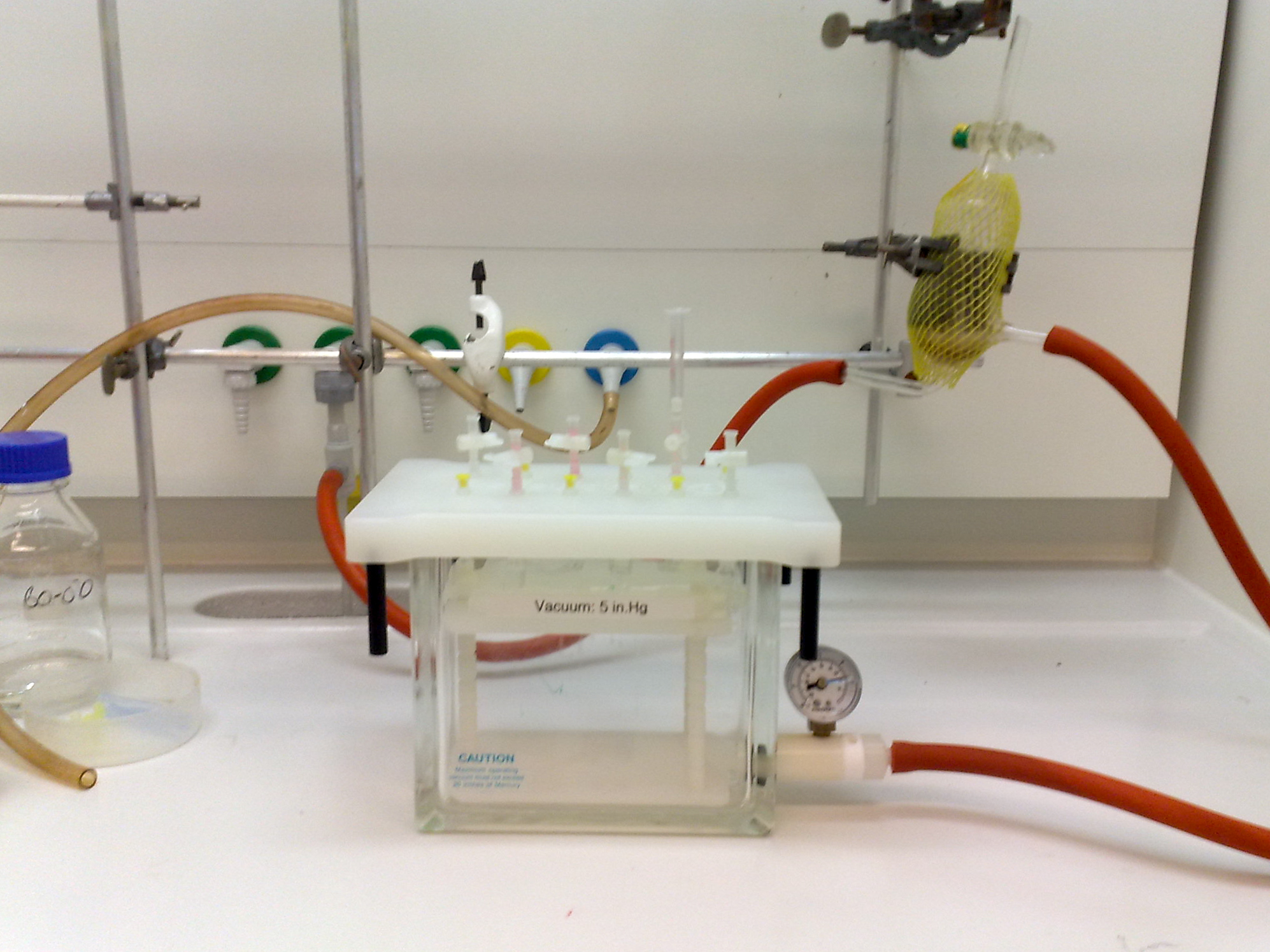 SPE